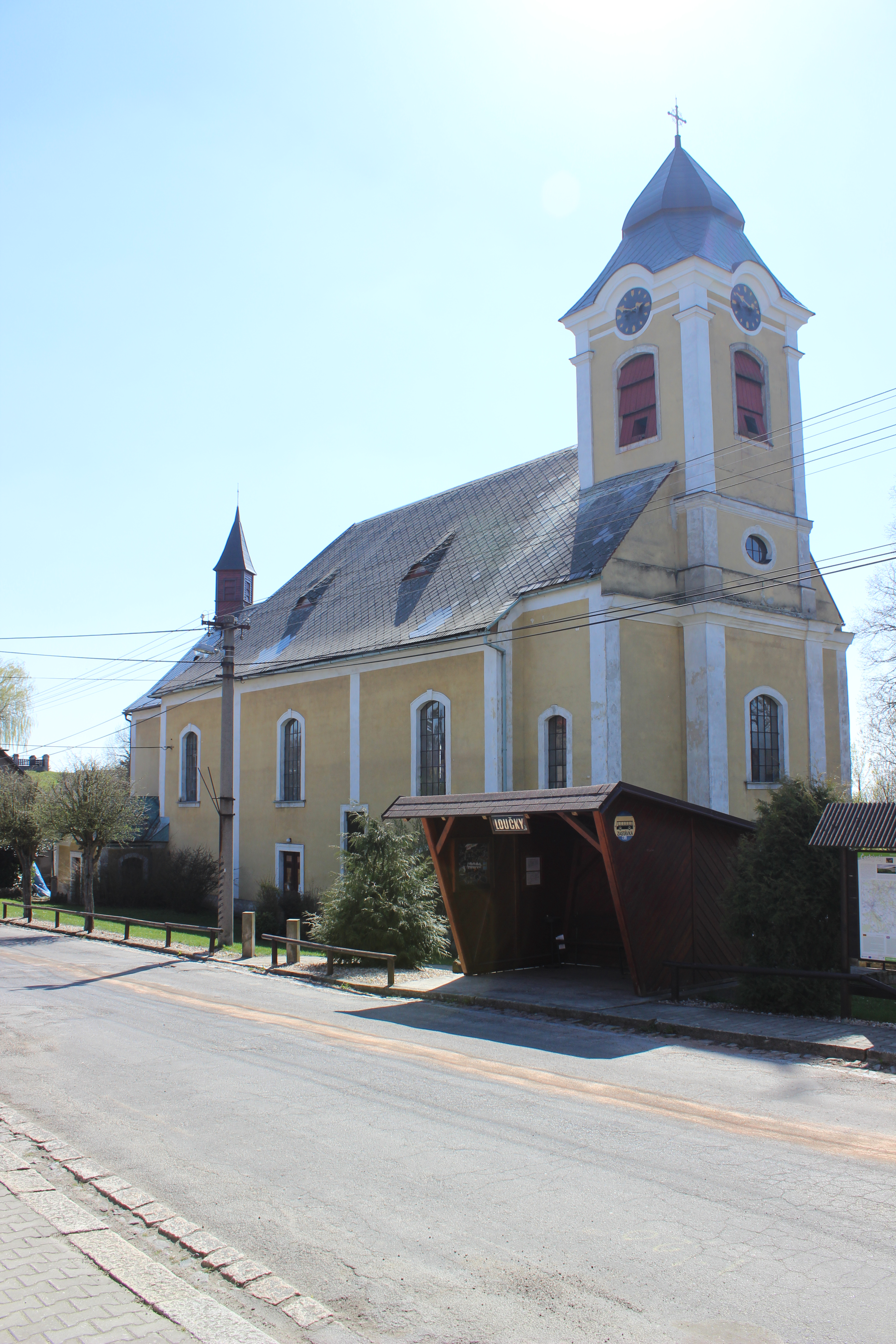 Kostel svatého Antonína Paduánského v Loučkách v okrese Semily.